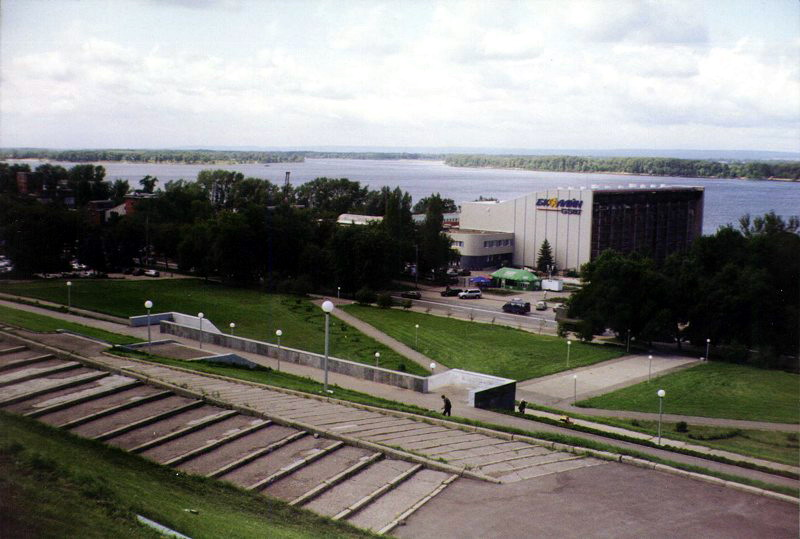 eo Rivero Volga cxe urbo Samara (2004). ru Река Волга у города Самара (2004). La fonta bildo de cxi tiu bildo estas ankaux en mia propra retpagxaro [1] Mi, auxtoro de la bildo, permesas al cxiuj uzi gxin kun cxi tiuj kondicxoj